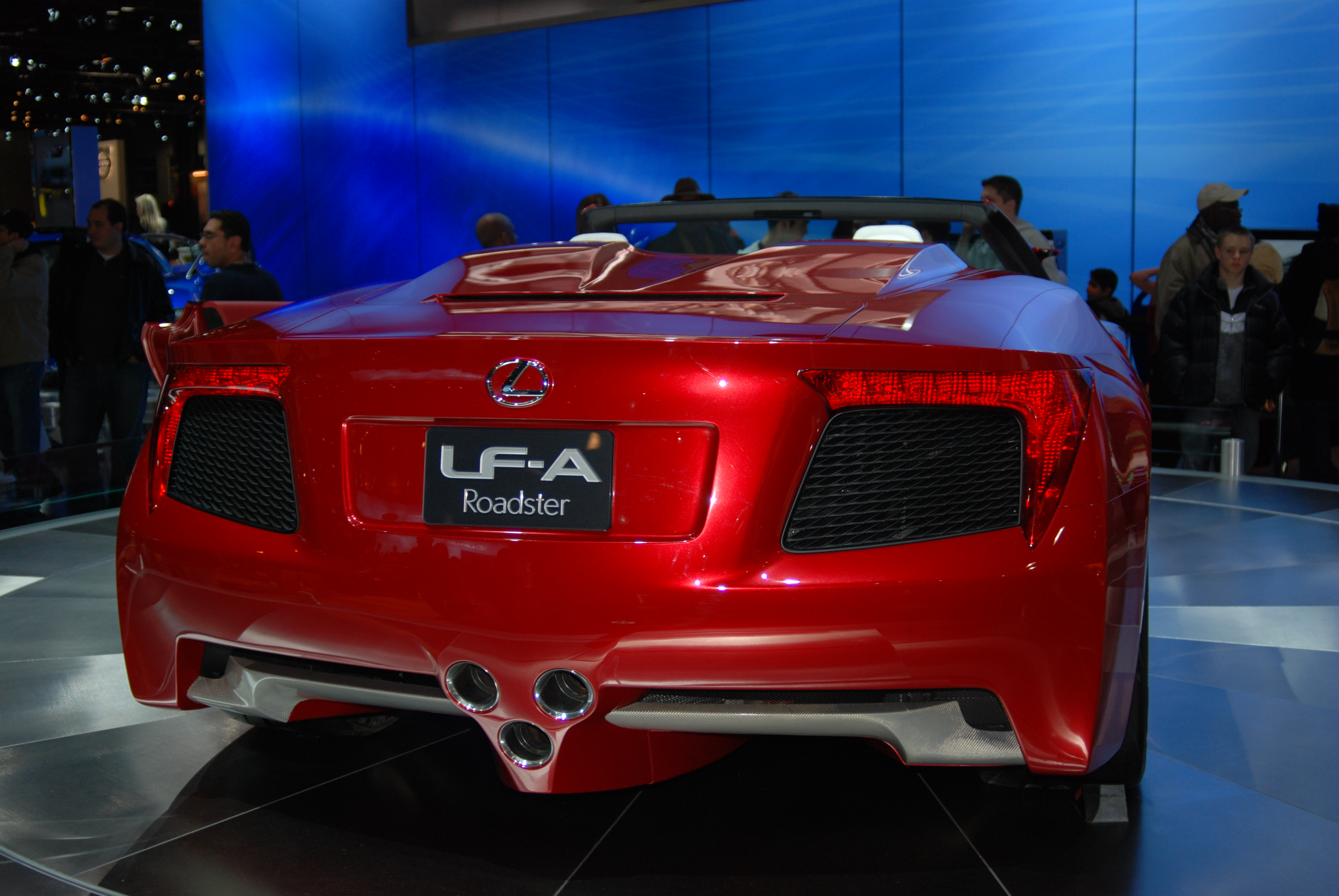 LF-A Roadster